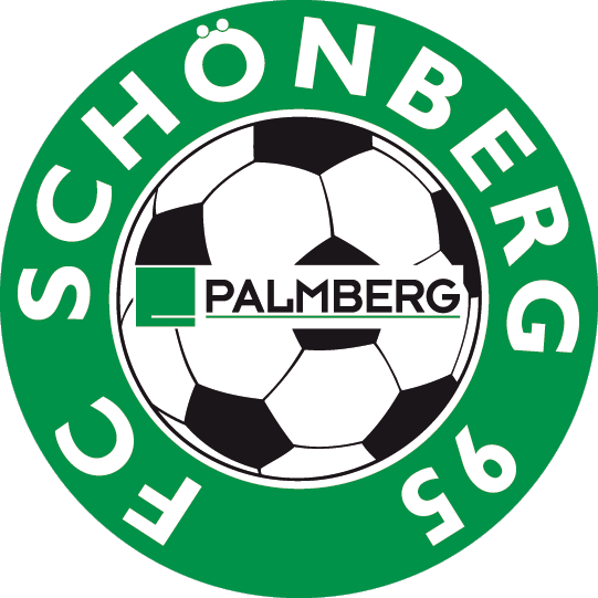 Logo des FC Schönberg 95 in der Zeit von 2001 bis 2002